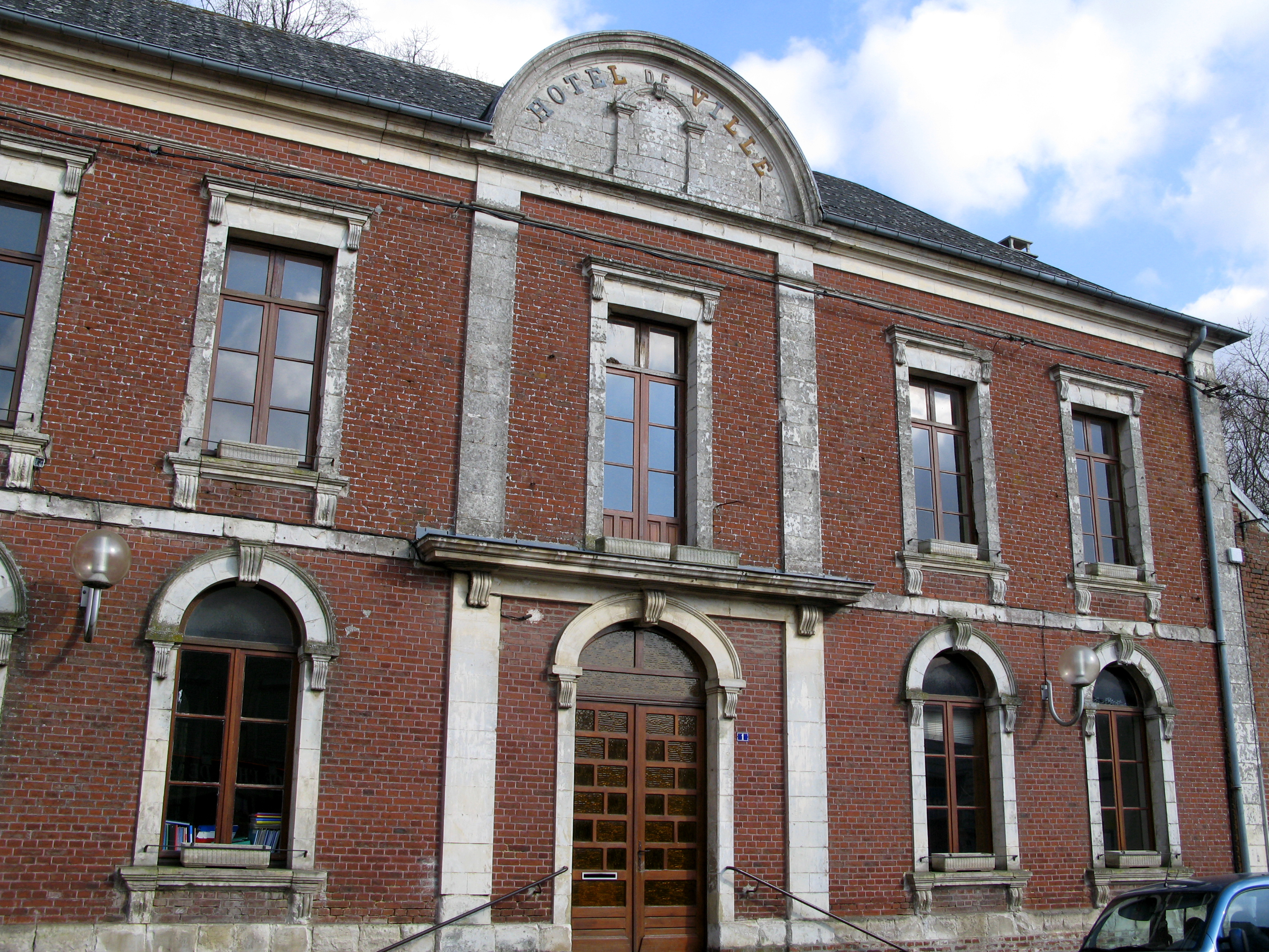 Acheux-en-Amiénois (Somme, France) - L'hôtel-de-ville.